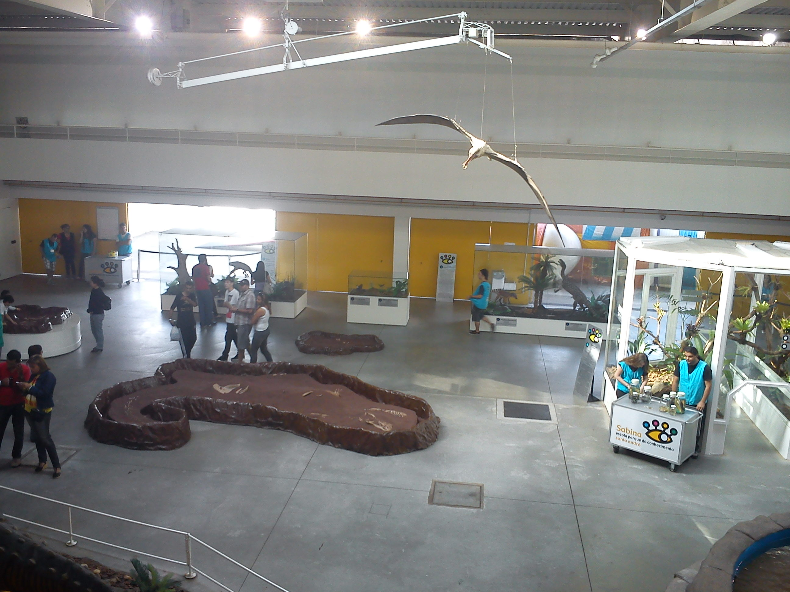 Sabina Escola Parque do Conhecimento in Santo André, Brazil.